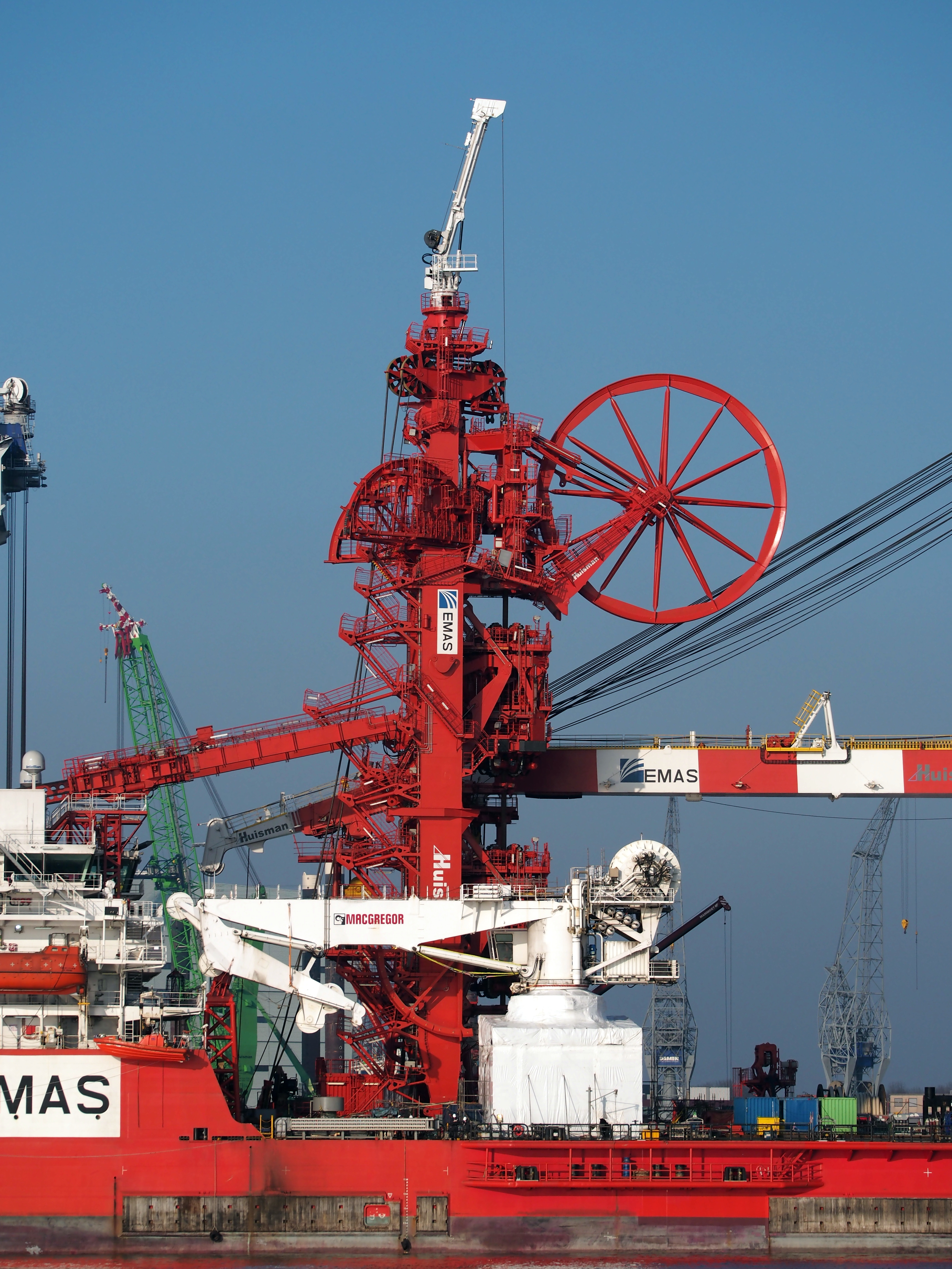 LEWEK CONSTELLATION IMO 9629756, Nieuwe Maas, Port of Rotterdam.